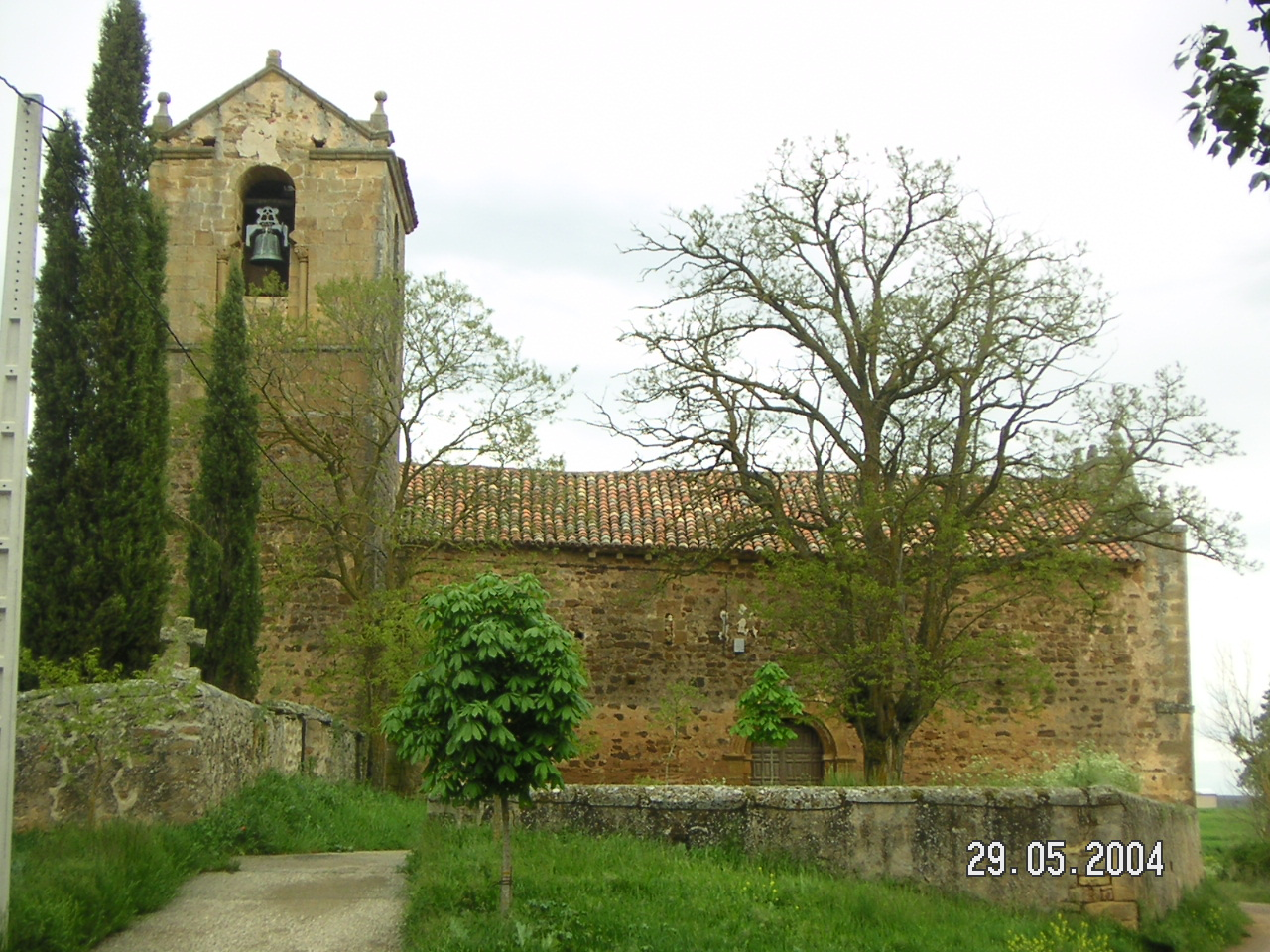 Iglesia de la Asunción, en Arancón (Soria, España)